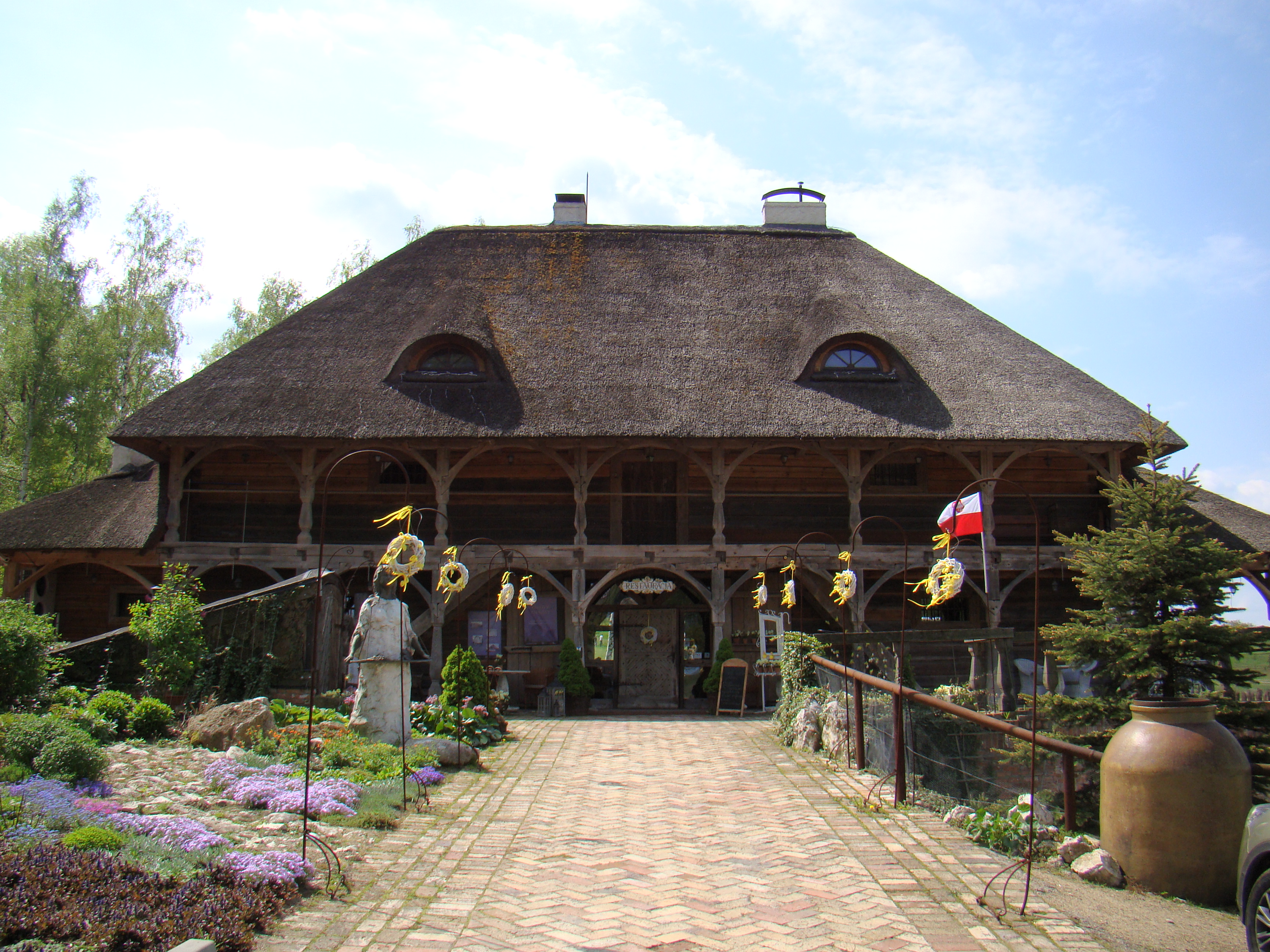 Olsztyn (przeniesiony z Borowna), spichrz